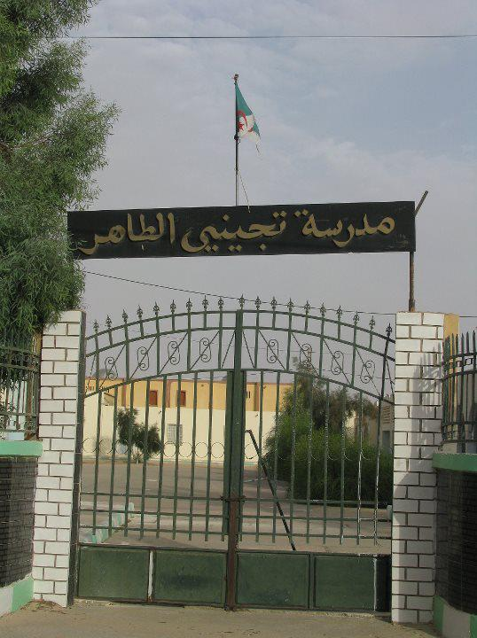 مدرسة تجيني الطاهر